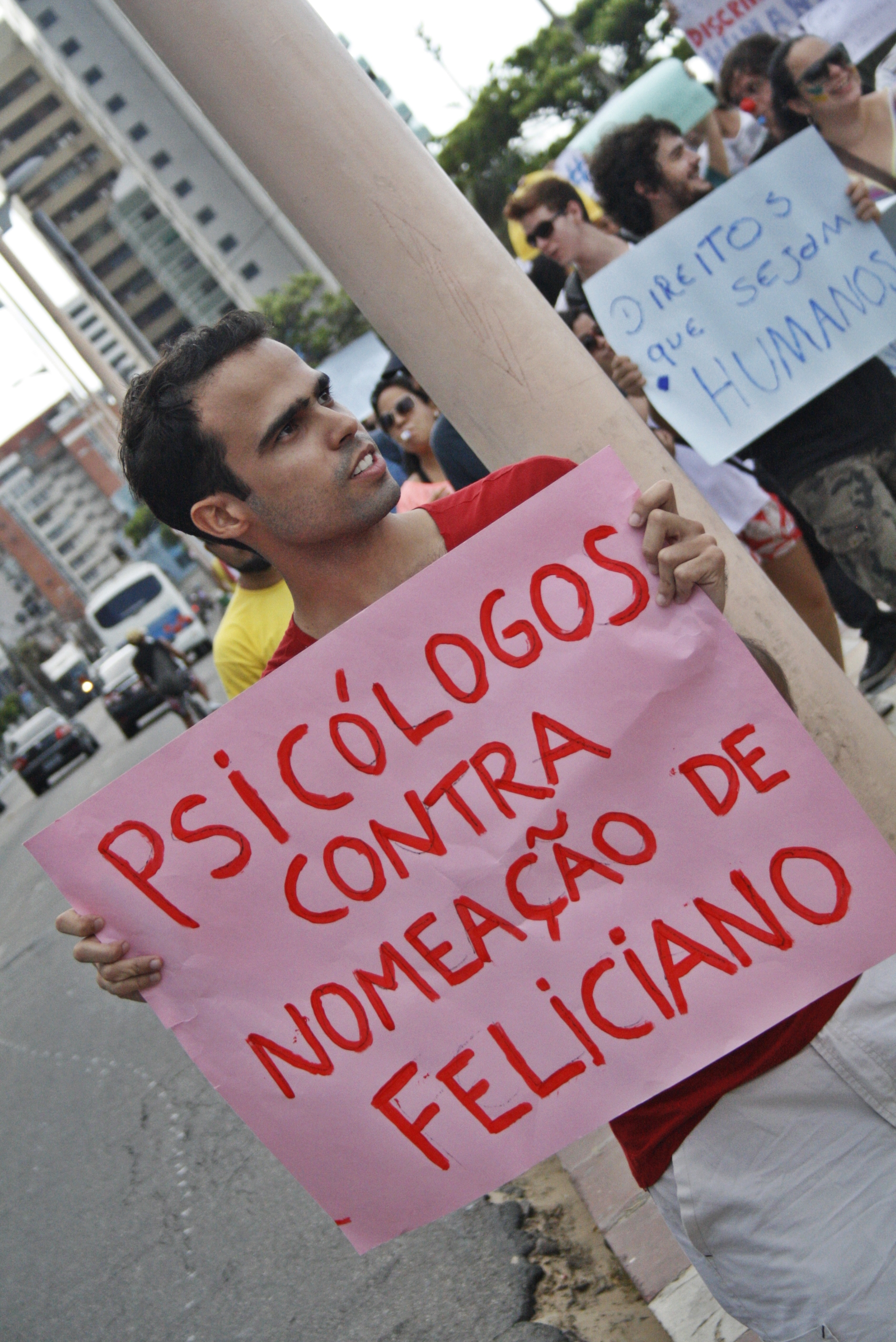 09/03/2013 Manifestantes foram às ruas em Fortaleza em ato contra nomeação de Marcos Feliciano para Comissão de Direitos Humanos. (CC BY-SA Fora do Eixo)